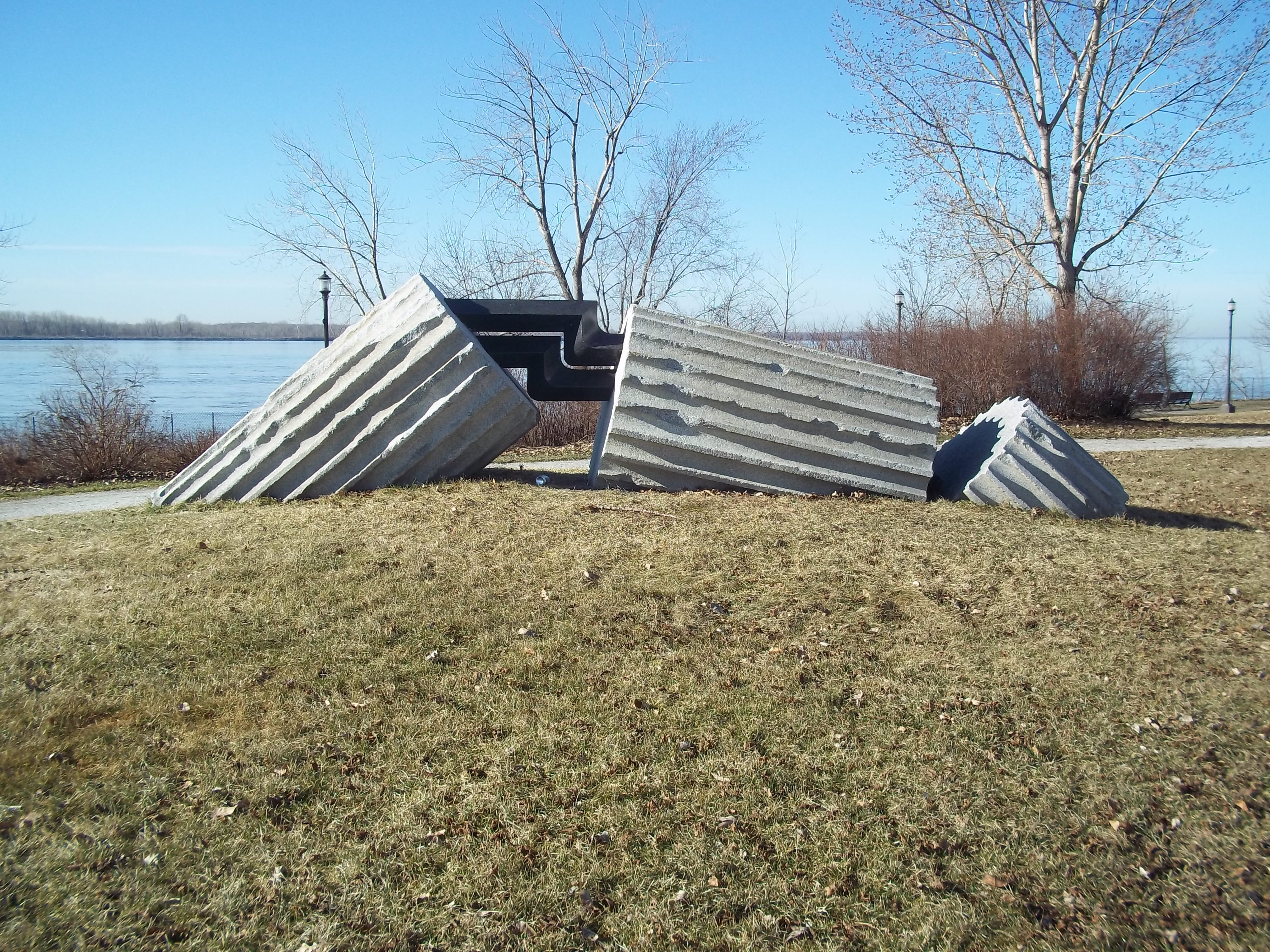 Sculpture de Tekera Narita intitulée From A, de 1986. Elle est située au parc René-Lévesque, à Lachine.